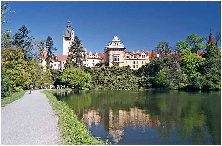 Zámek Průhonice od podzámeckého rybníka